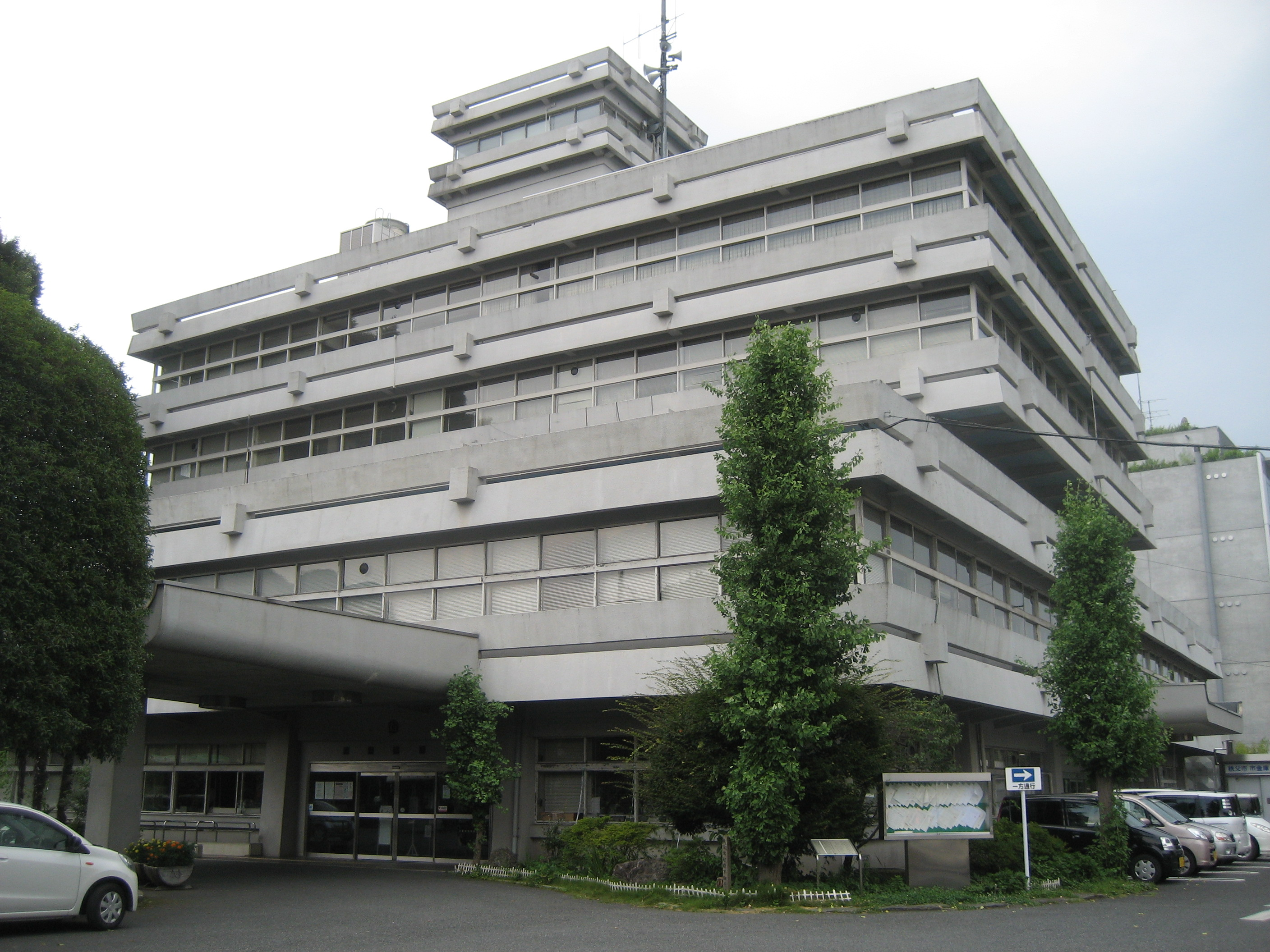 埼玉県秩父市役所庁舎